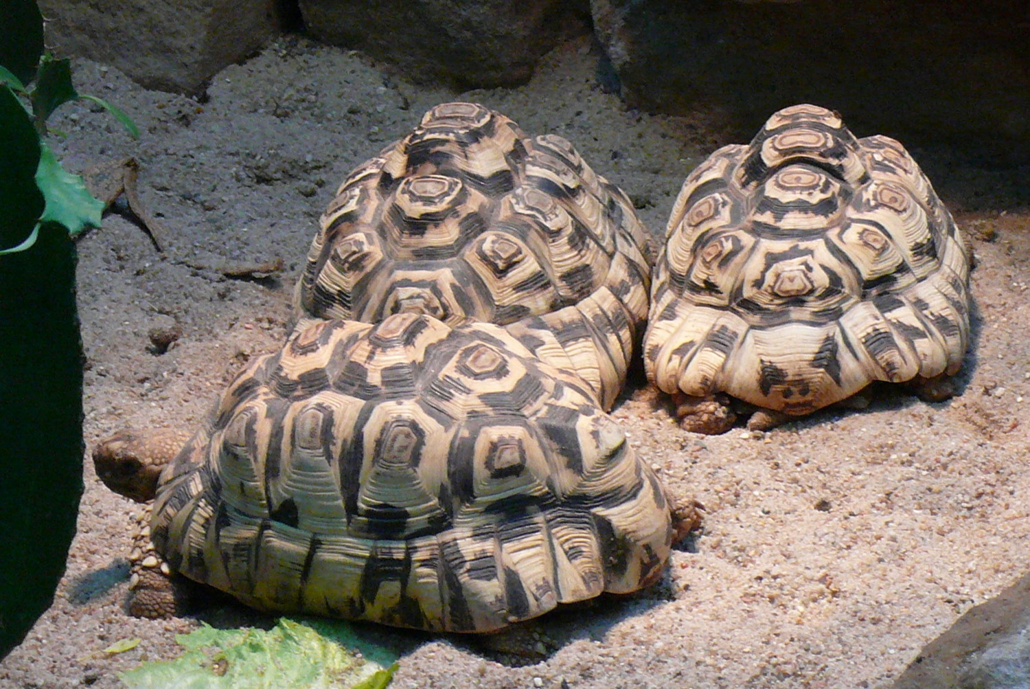 Geochelone pardalis